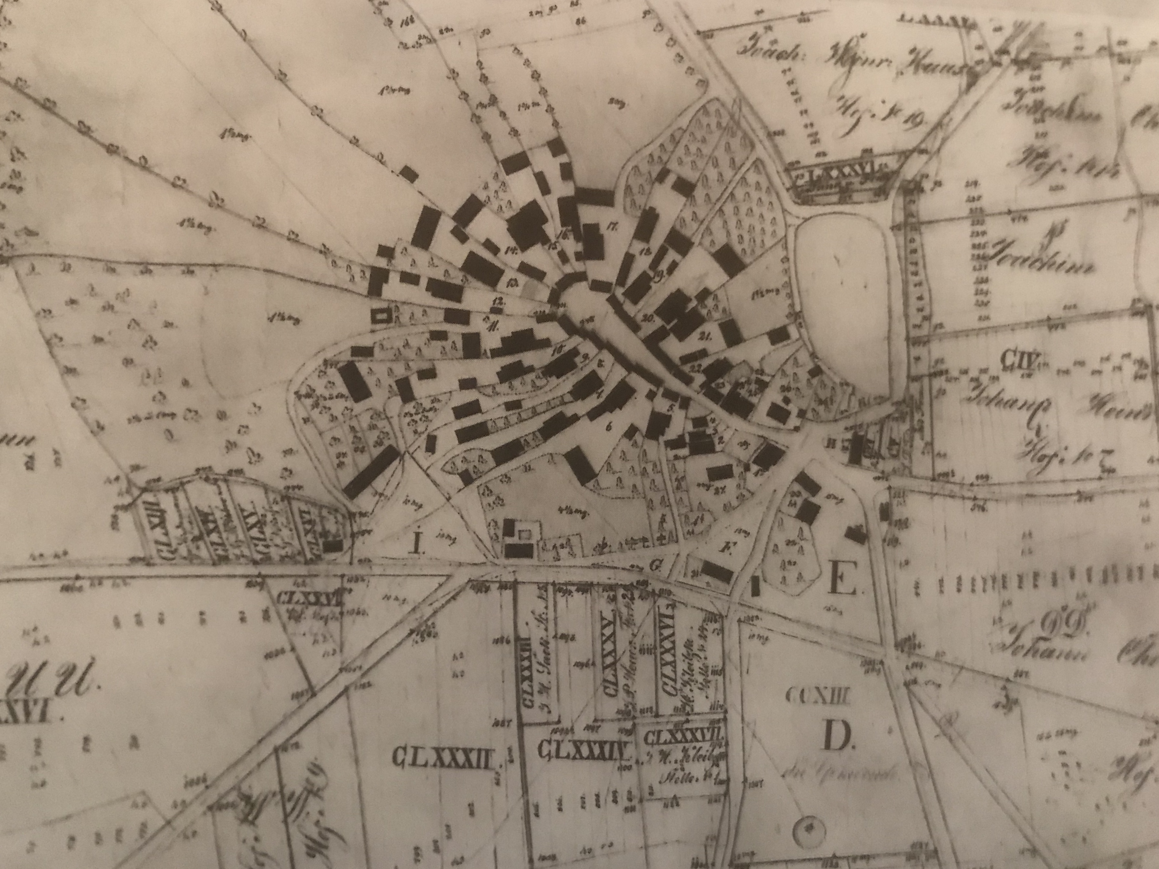 Flurkarte des Ortes von 1840, auf Feld 27 am damaligen Ortseingang, ist zur Orientierung die Dorfkirche abgebildet